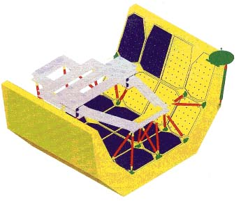 Darstellung einer Spacelab-Palette